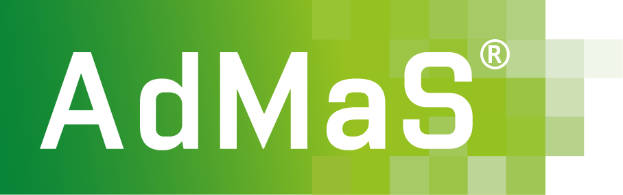 logo centra AdMaS